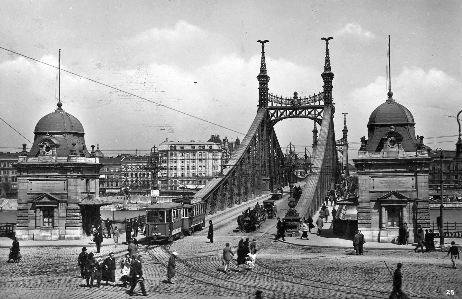 A Ferenc József híd a két világháború között (1928)